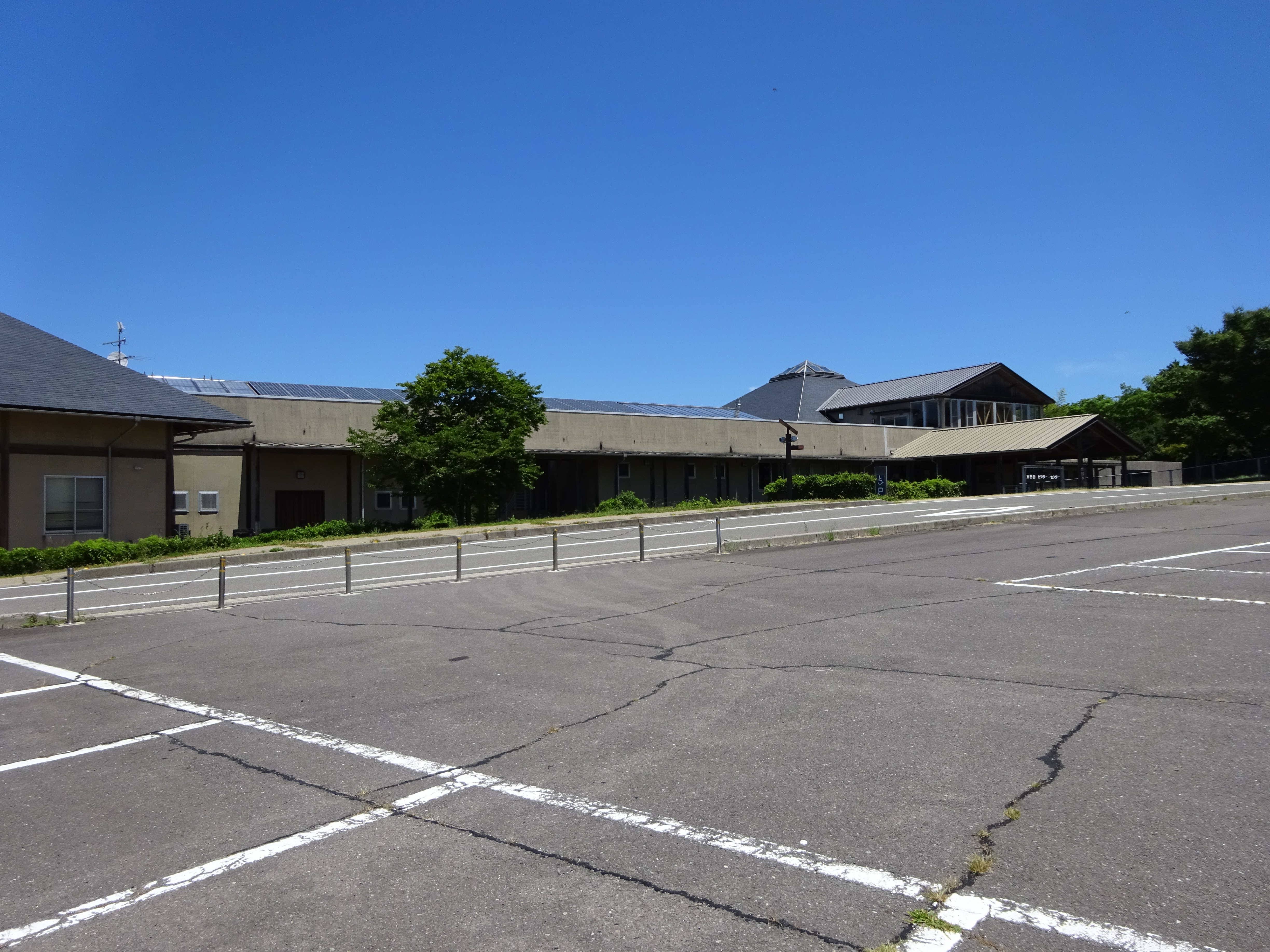 五色台ビジターセンター（閉館日）全景。七月下旬